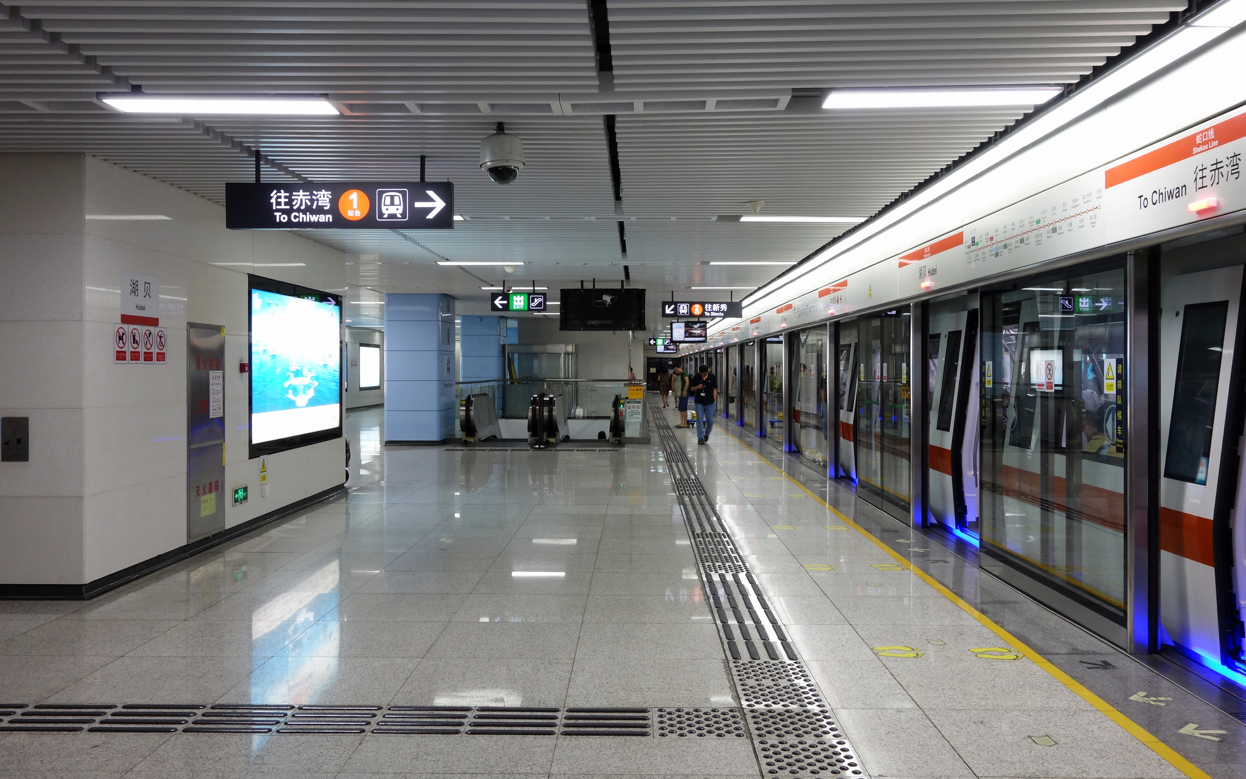 深圳地铁蛇口线湖贝车站地下二层的側式站台 (往赤灣方向)